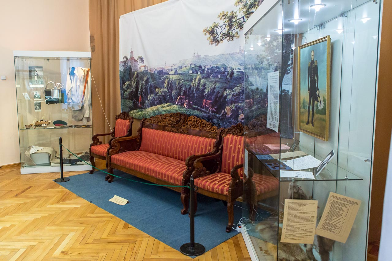 Фрагмент выставки «Гроза 1812 года» в Томском областном краеведческом музее, 2013 г.